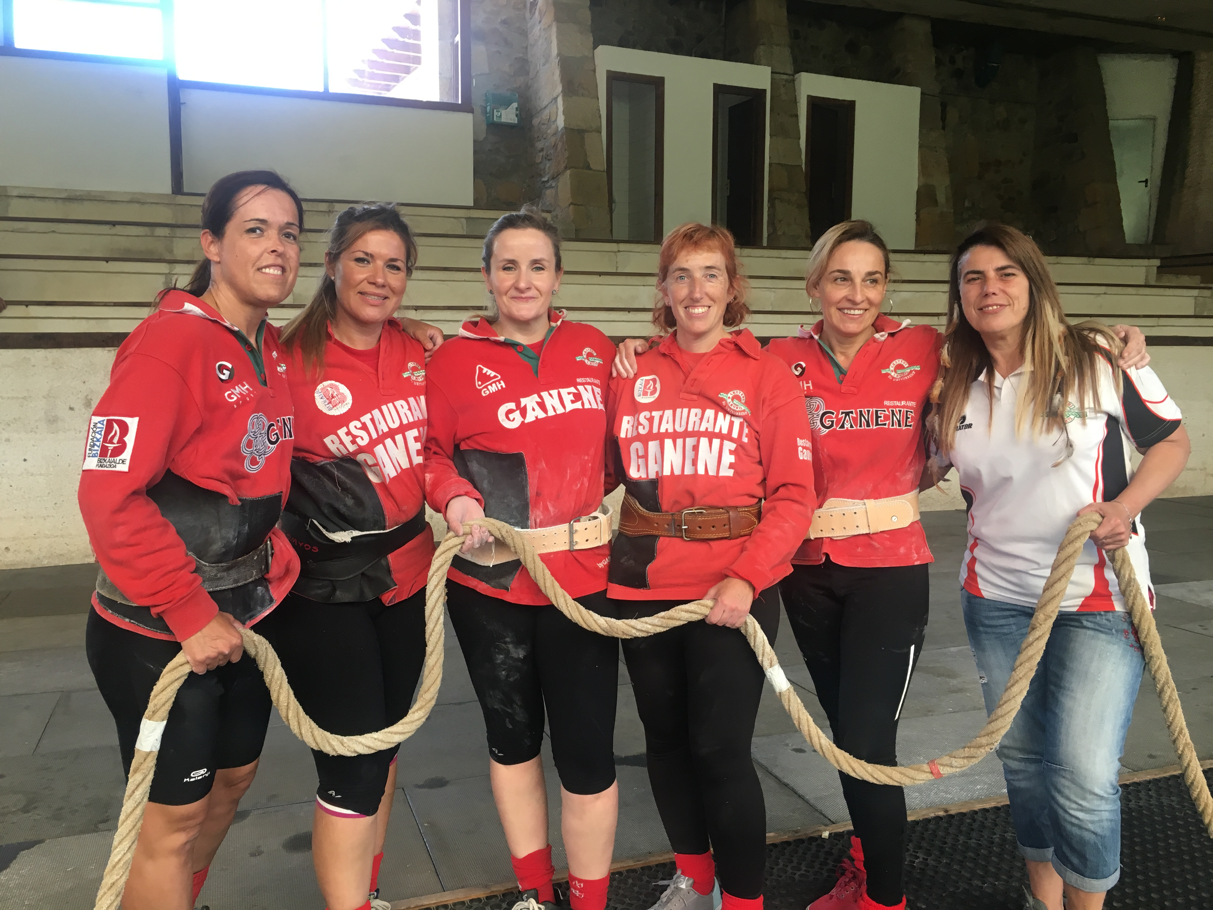 Gaztedi sokatira taldea ( emakumezkoak) Kirol Egunean